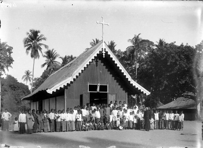 Negatief. Groepsportret met missionaris pastoor J. van der Loo voor de Rooms-Katholieke kerk te Konga